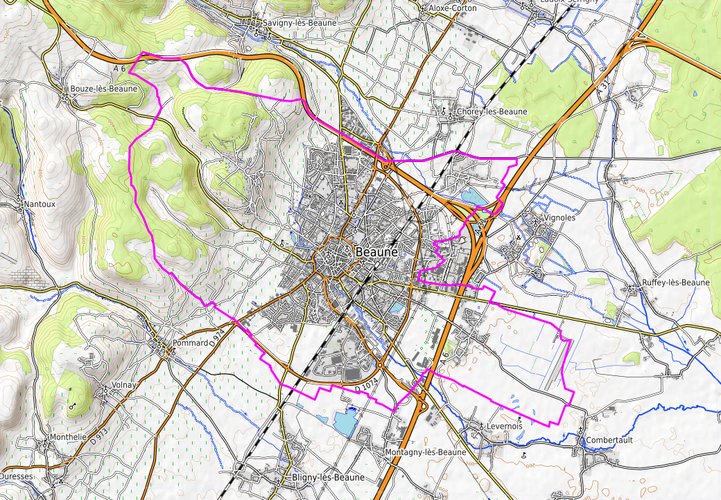 carte réalisée sur umap This map may be incomplete, and may contain errors. Don't rely solely on it for navigation.